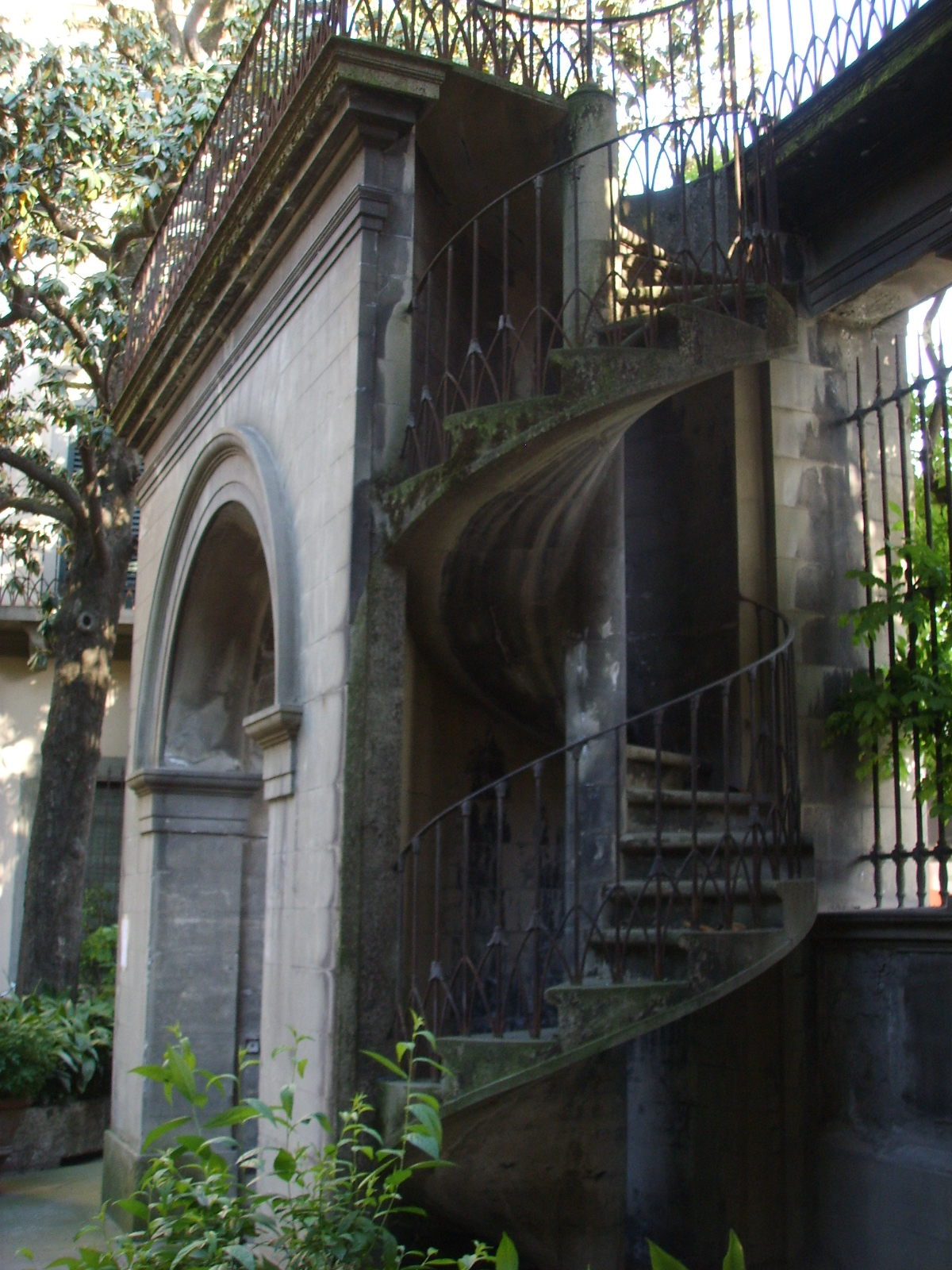 Palazzo malenchini alberti, giardino, portale 03 scala